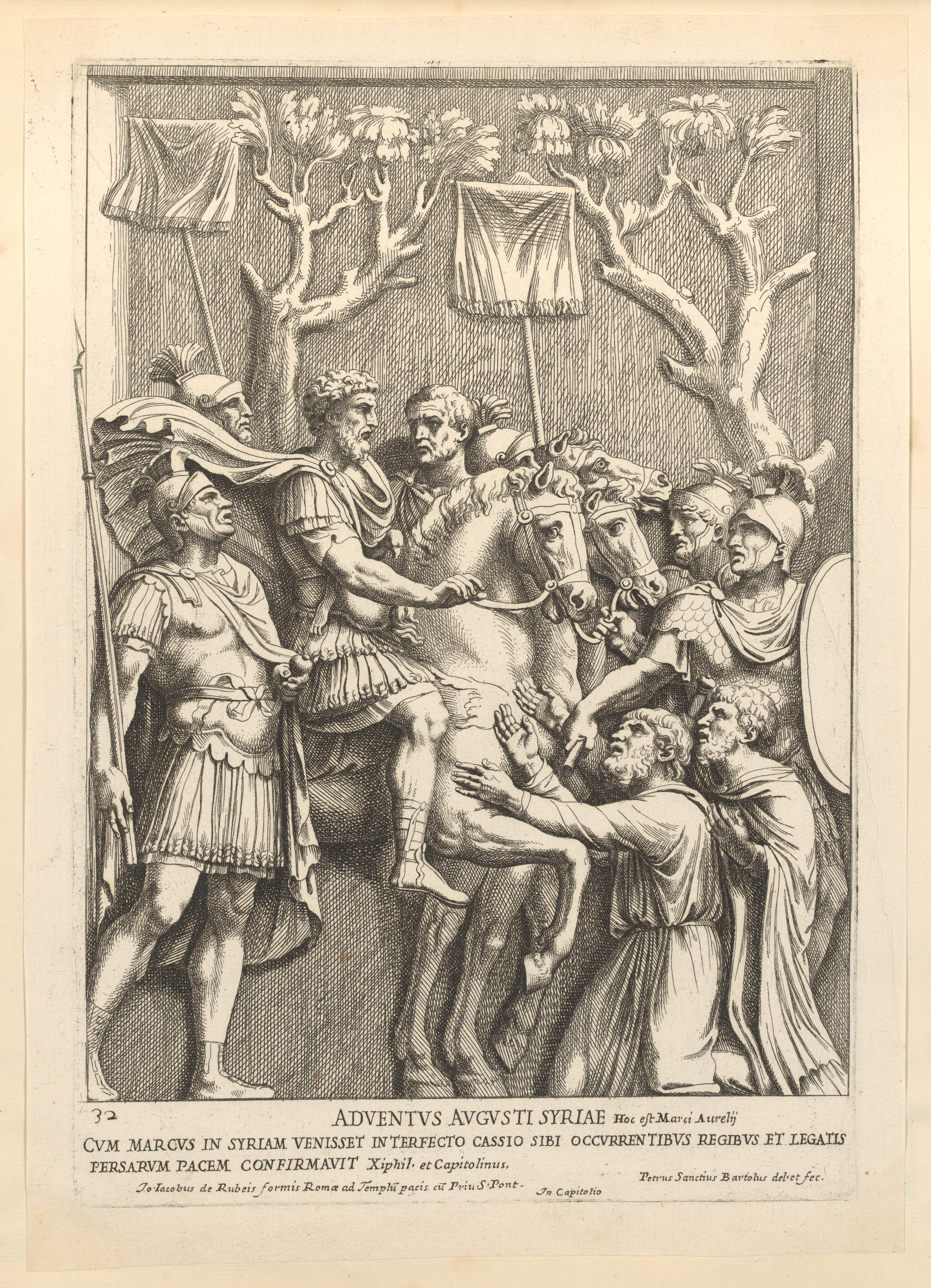 Book; Books